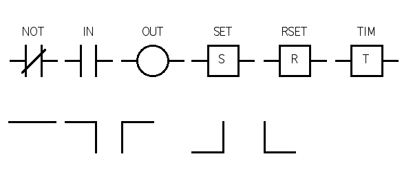 Symbols for ladder diagram